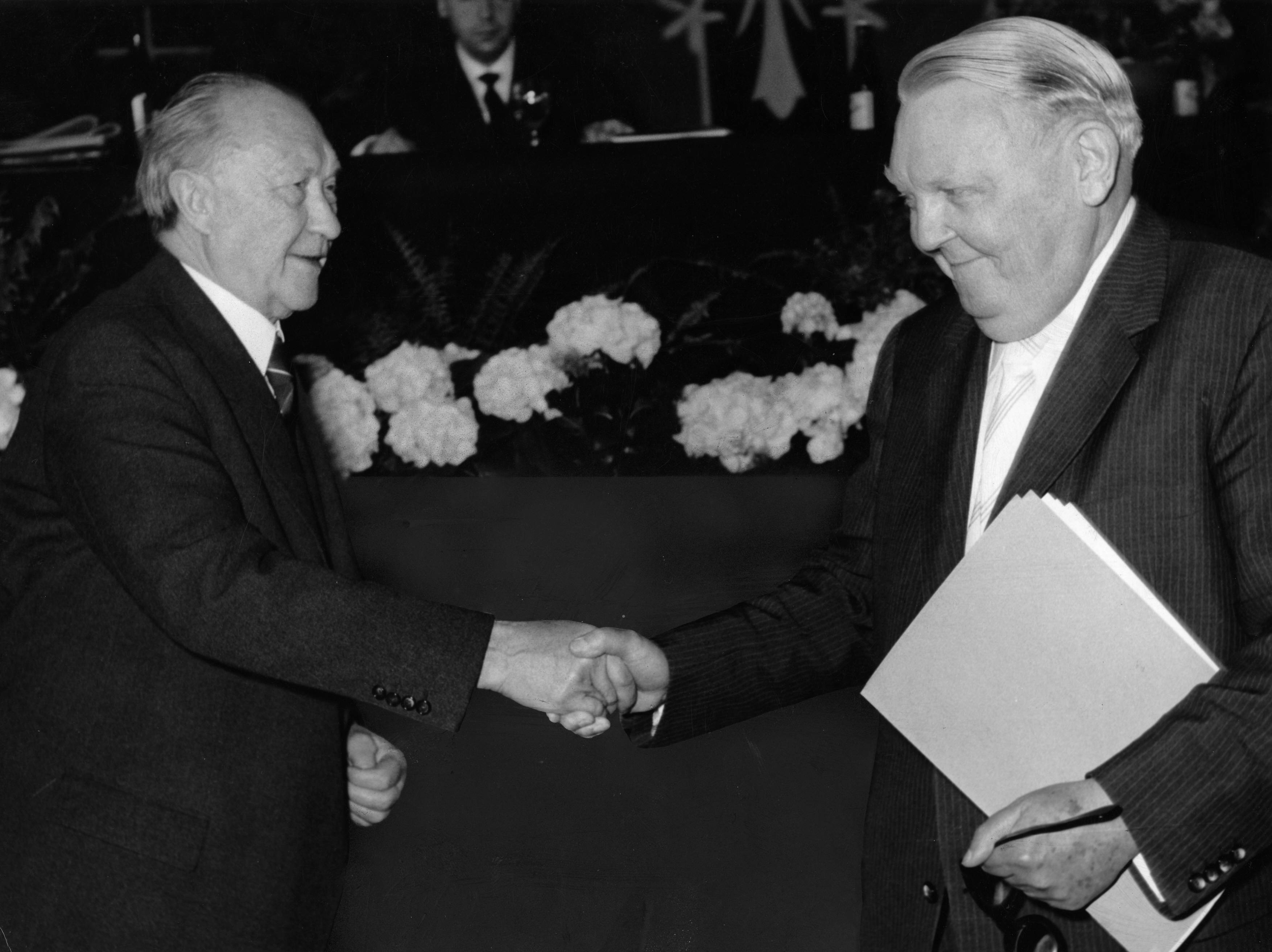 Adenauer, Konrad9. CDU-Bundesparteitag, 26.04.1960 - 29.04.1960